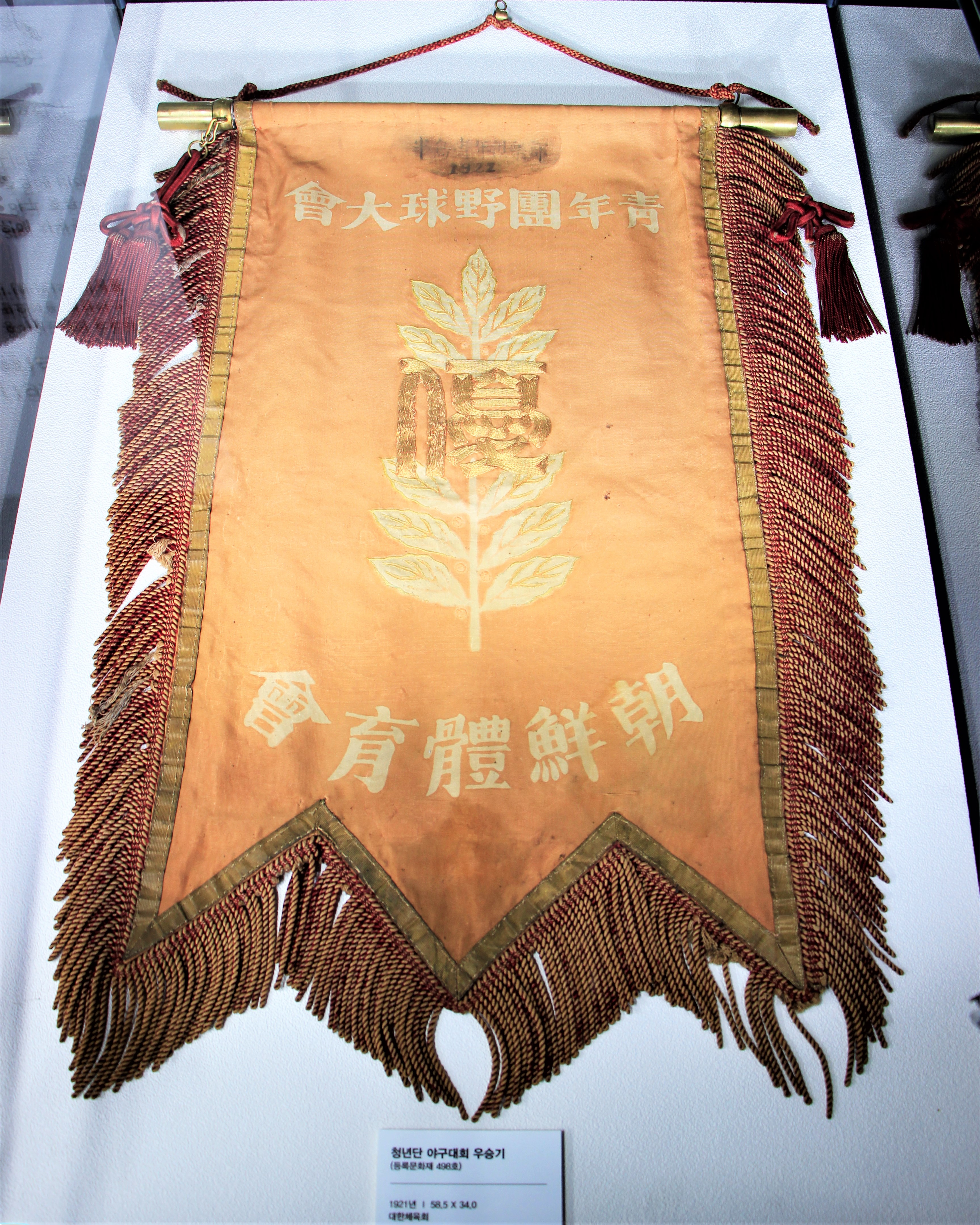 전조선야구대회(전국체육대회의 모체) 2회 청년단 우승기